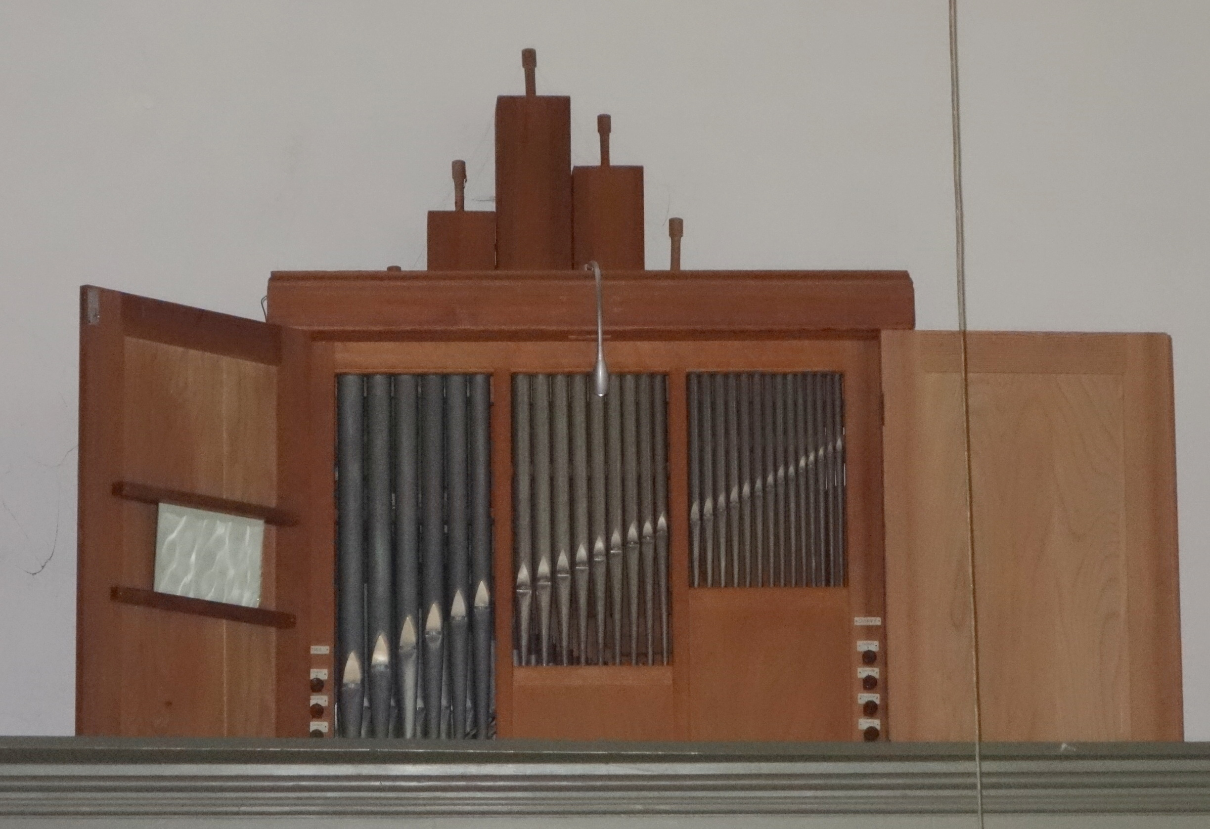 Orgel der Stadtkirche Preetz, Schleswig-Holstein, Deutschland